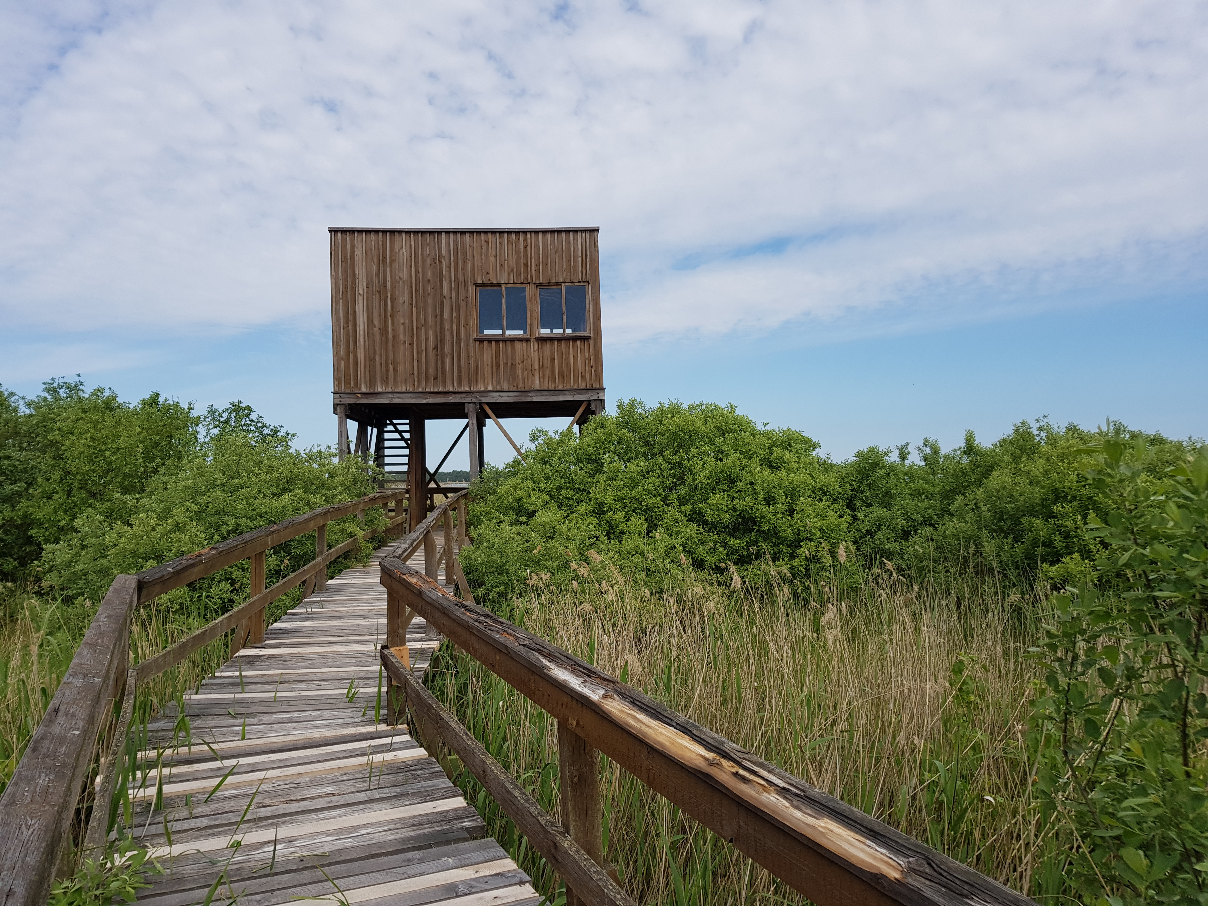 Žuvinto rezervato apžvalgos bokštas su pažintiniu taku